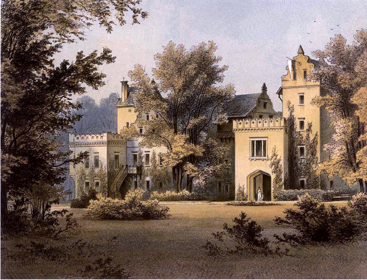 Schloss Neuhoff, Kreis Hirschberg, Palast der Fürsten von Reuss-Köstritz